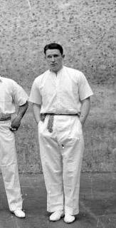 Pablo Elguezábal in 1932